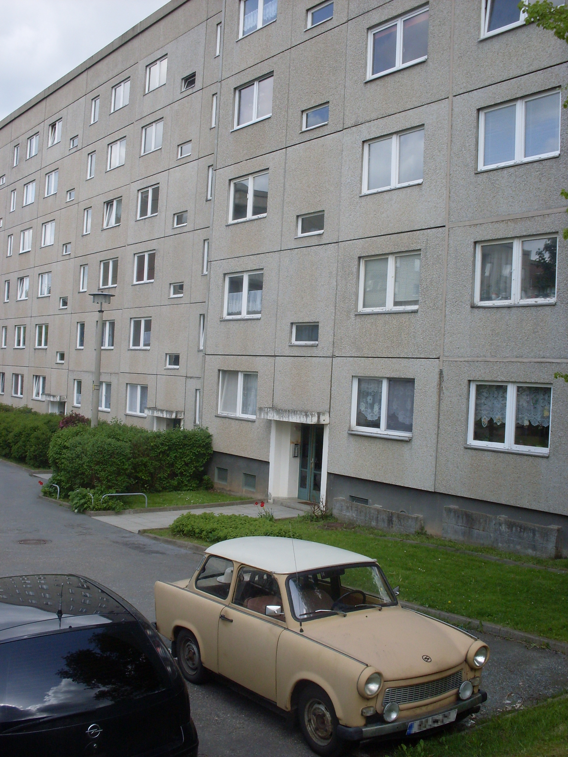 Ein Plattenbau vom Typ: WBS 70 in Chemnitz, am 16. Mai 2010.